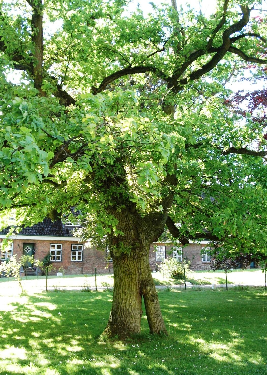 Doppeleiche – Kloster Preetz